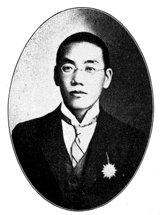 國會議員肖像